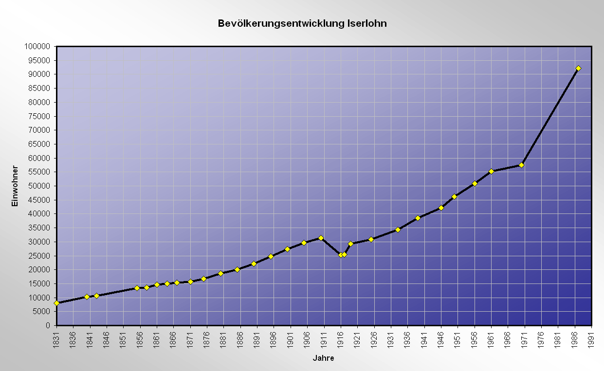 Iserlohner Bevölkerungsentwicklung nach Volkszählungsergebnissen (1831—1987)